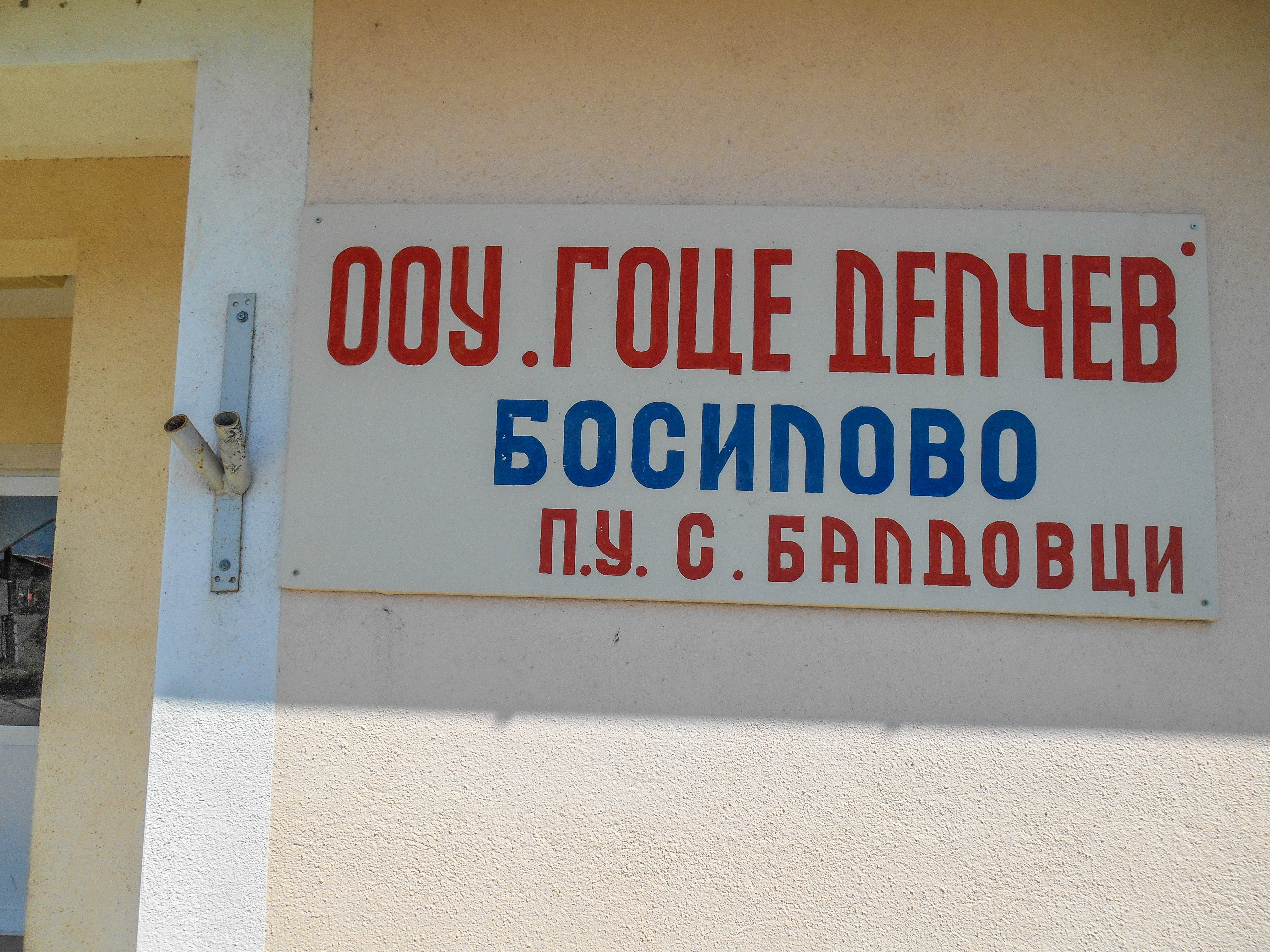 Основно училиште „Гоце Делчев“ - Старо Балдовци